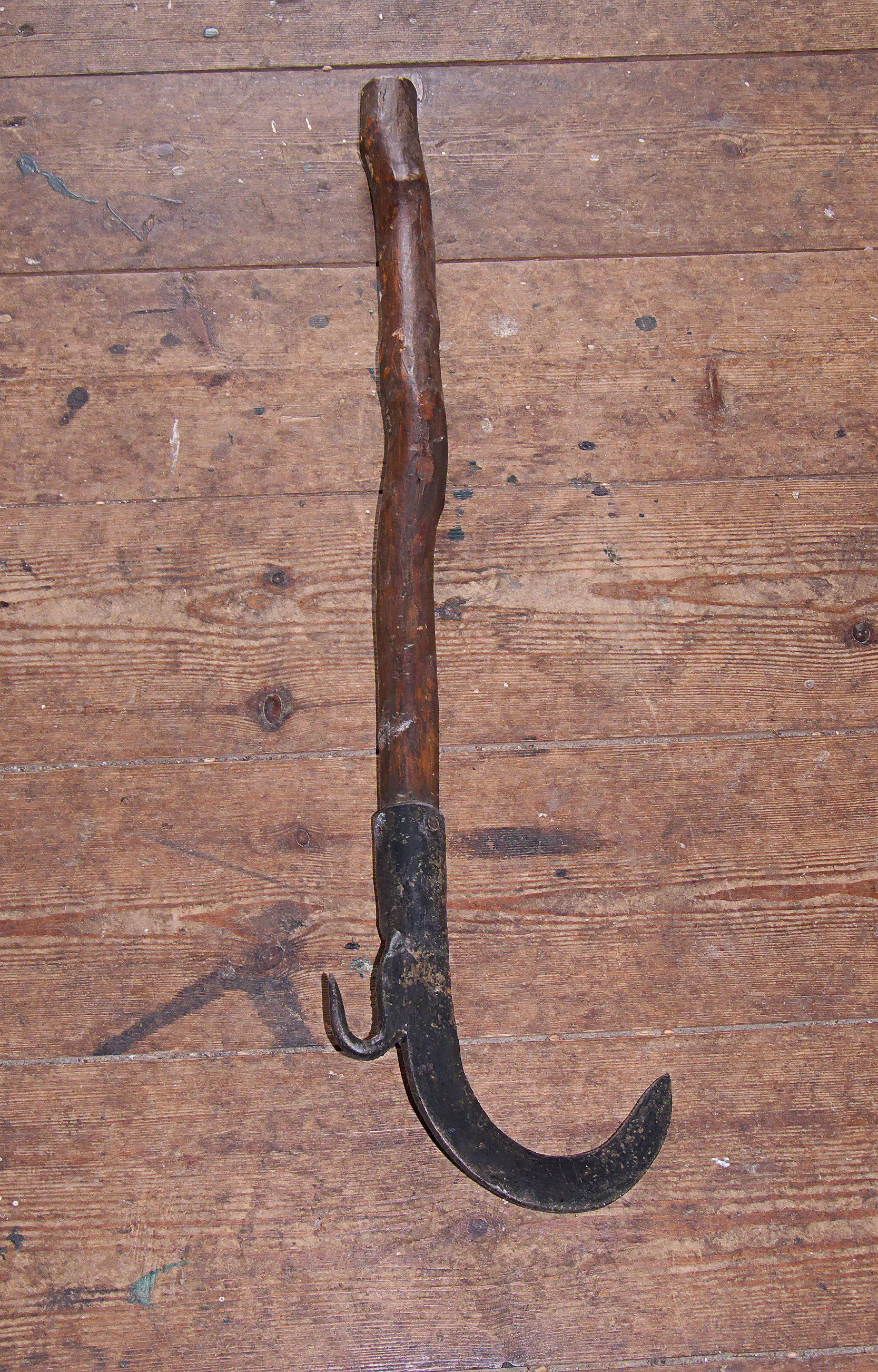 pikhaak